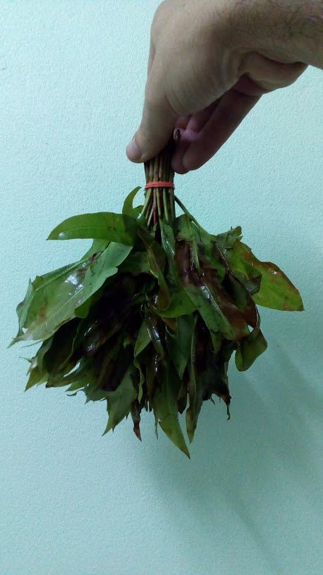 Пучок Cratoxylum formosum з базару Убон Ратчатхані